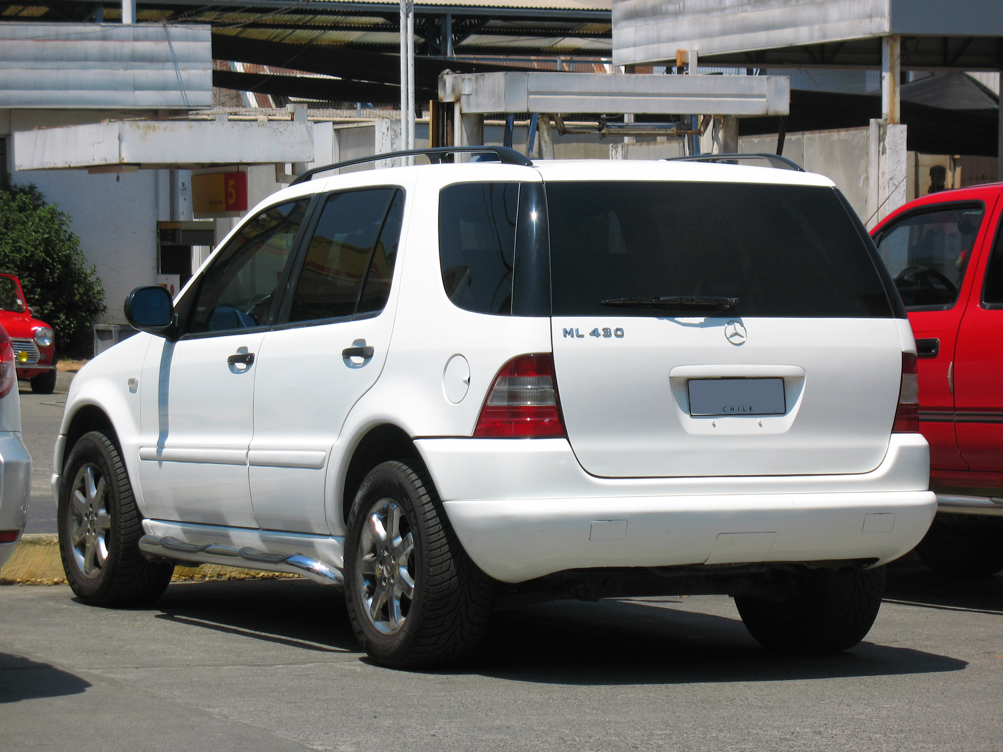 Mercedes Benz ML 430 1999